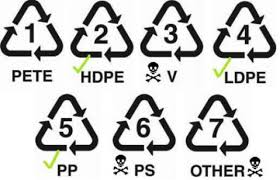 Знаците за рециклирање на различни амбалажи